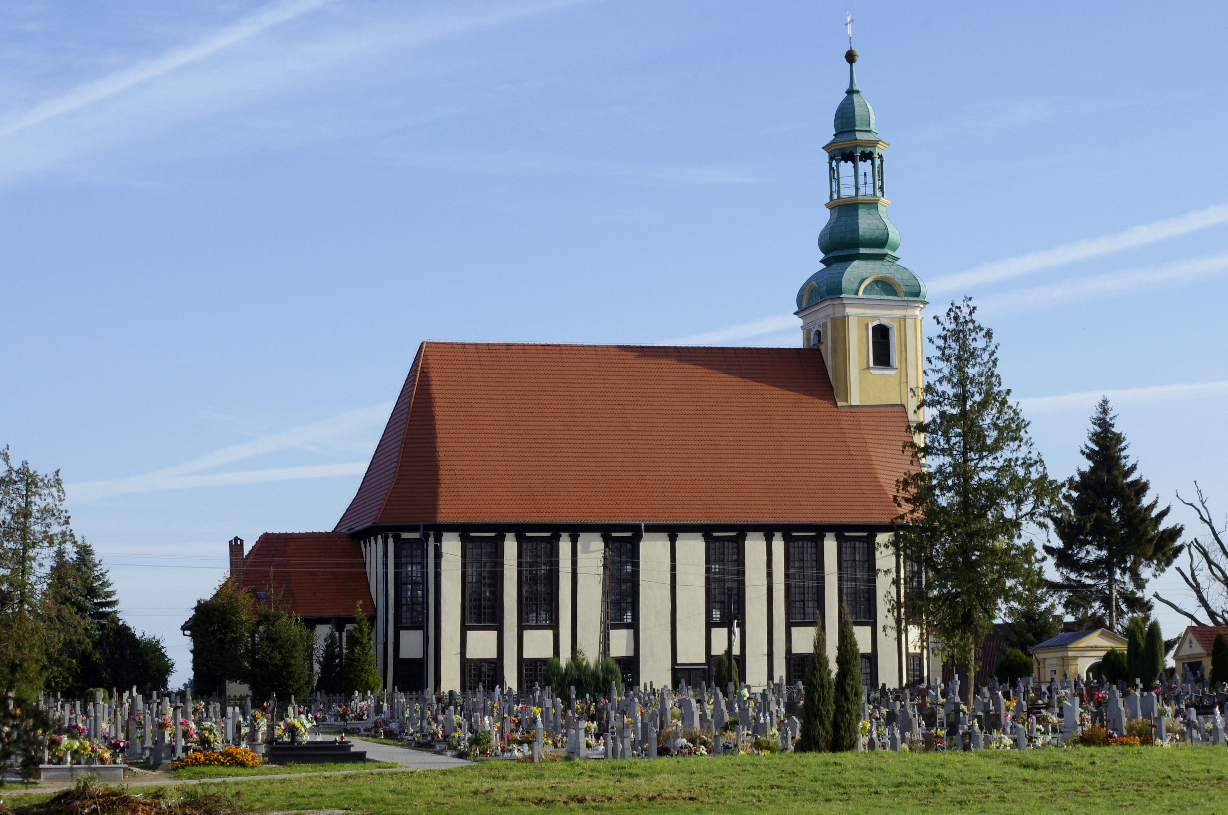 Kościół par. Narodzenia NMP, Wierzchowice, ul. Kościelna 19